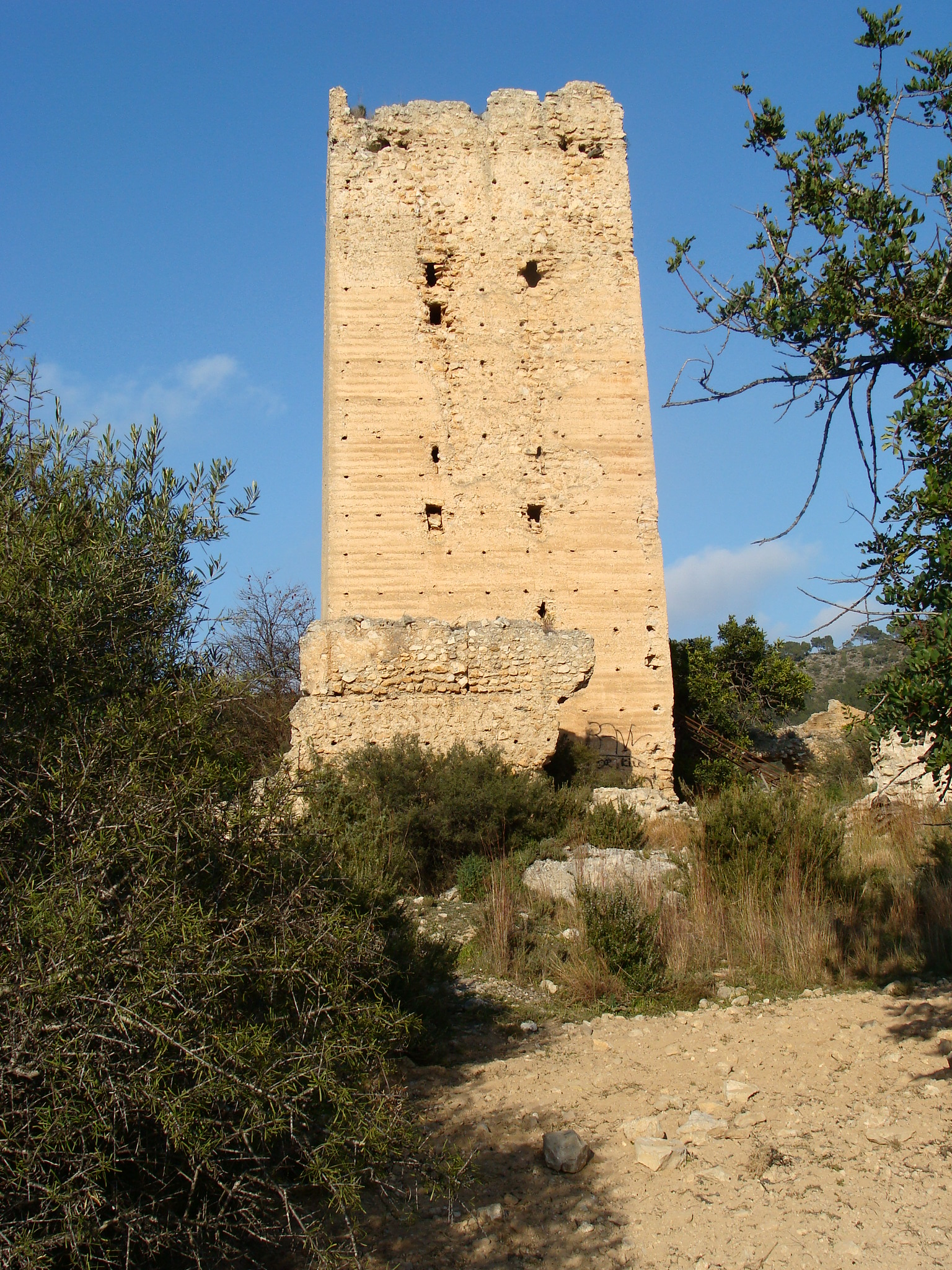 Castillo de Alédua (Llombay, Valencia)